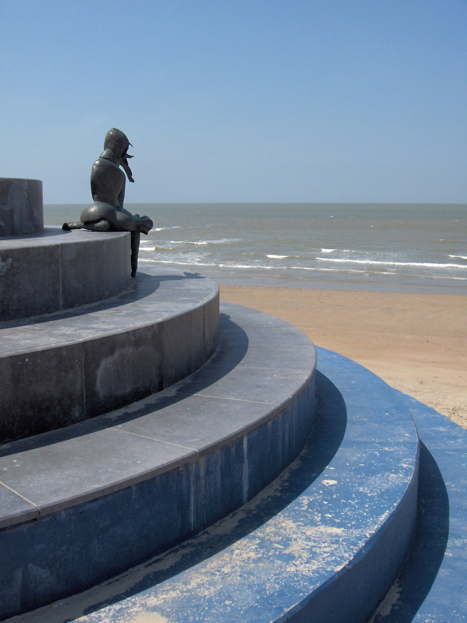 Hulde aan Léon Spilliaert, beeld langs de Zeedijk in Oostende, België; gemaakt naar "Duizeling", tekening in gewassen Oost-Indische inkt, aquarel en kleurkrijt uit 1908